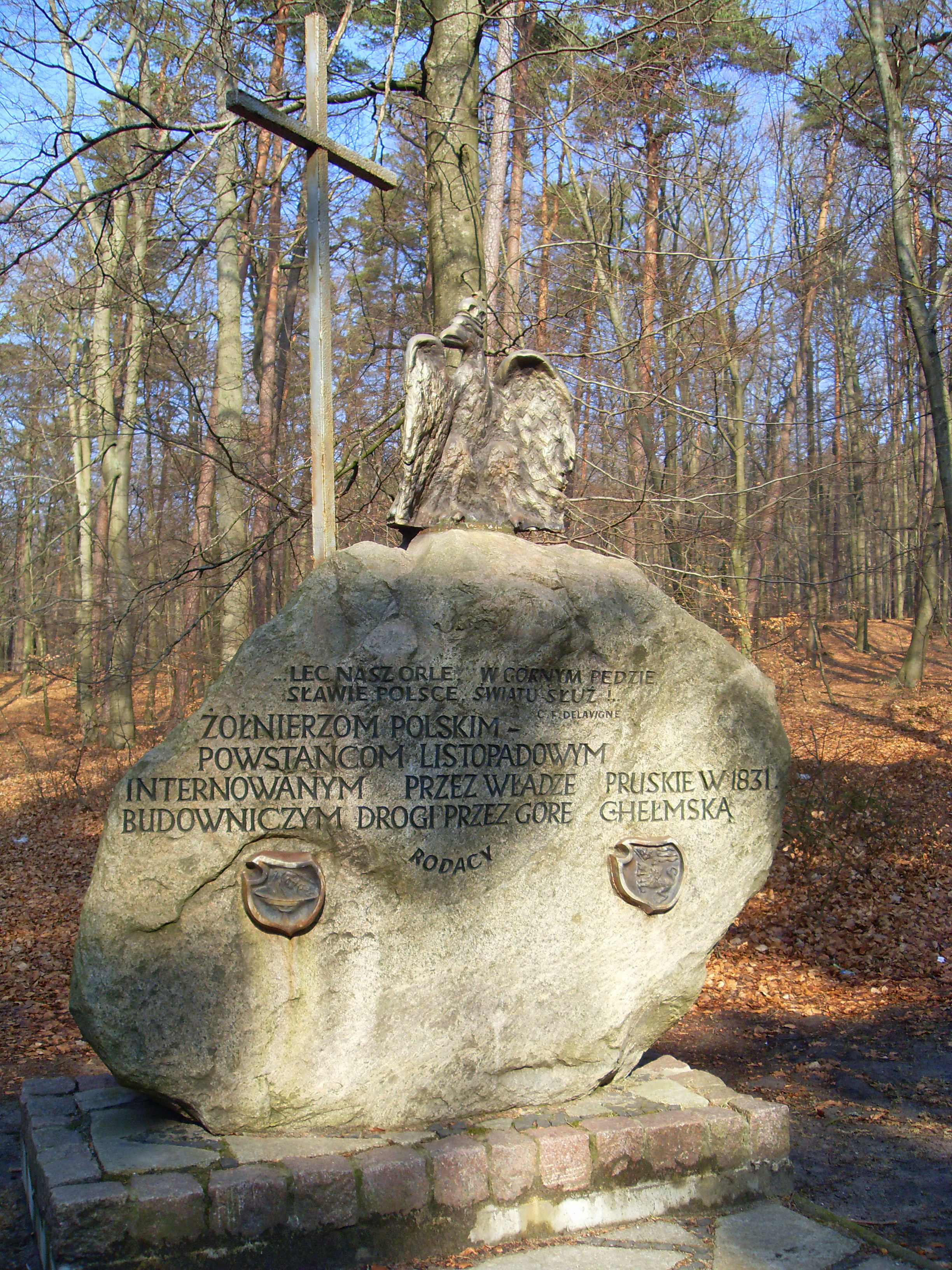 Kamień pamiątkowy poświęcony powstańcom listopadowym, budowniczym drogi przez Górę Chełmską. Na kamieniu fragment Warszawianki: Leć nasz Orle, w górnym pędzie, Sławie, Polsce, światu służ! oraz słowa: ŻOŁNIERZOM POLSKIM - POWSTAŃCOM LISTOPADOWYM INTERNOWANYM PRZEZ WŁADZE PRUSKIE W 1831 ROKU BUDOWNICZYM DROGI PRZEZ GÓRĘ CHEŁMSKĄ RODACY